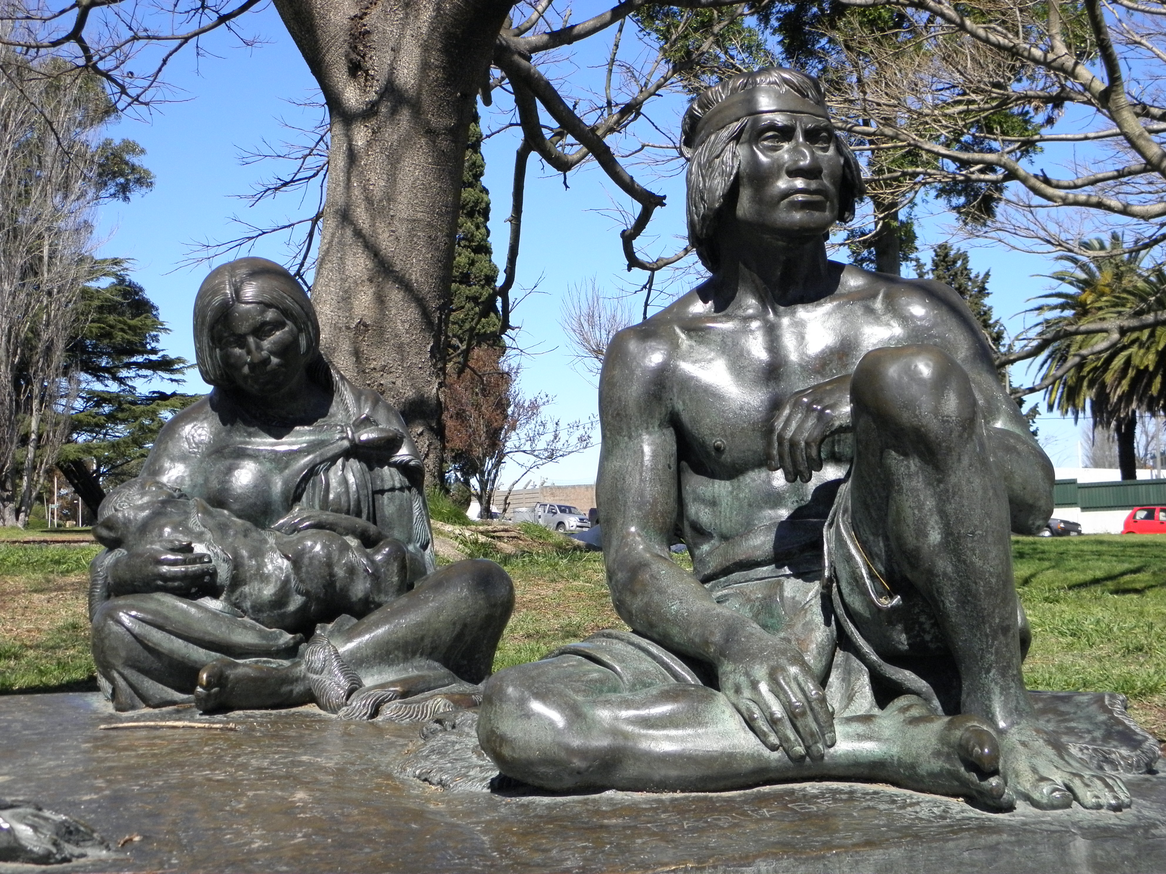 Los últimos charruas. Ubicada en el departamento de Montevideo